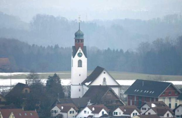 D katholisch Chile vo Boiel, Aargau, Schwiiz